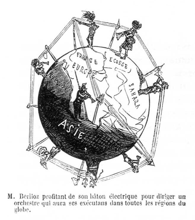 Berlioz - direction d'orchestre autour du monde